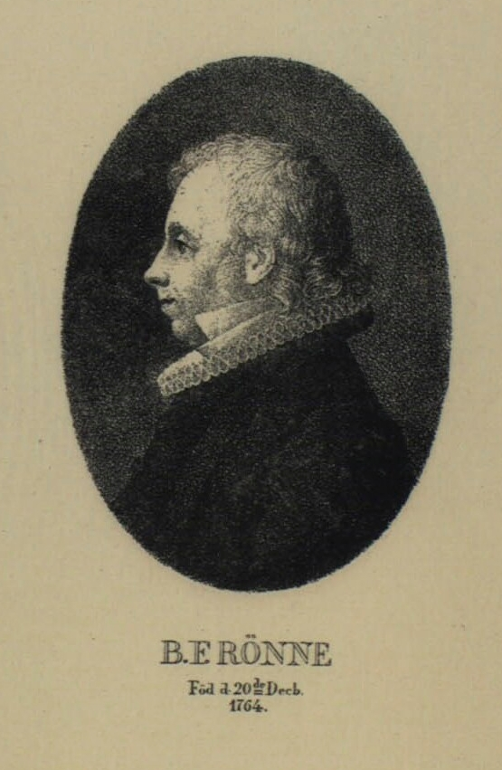 Bone Falck Rønne (20.12.1764-13.5.1833), dansk præst